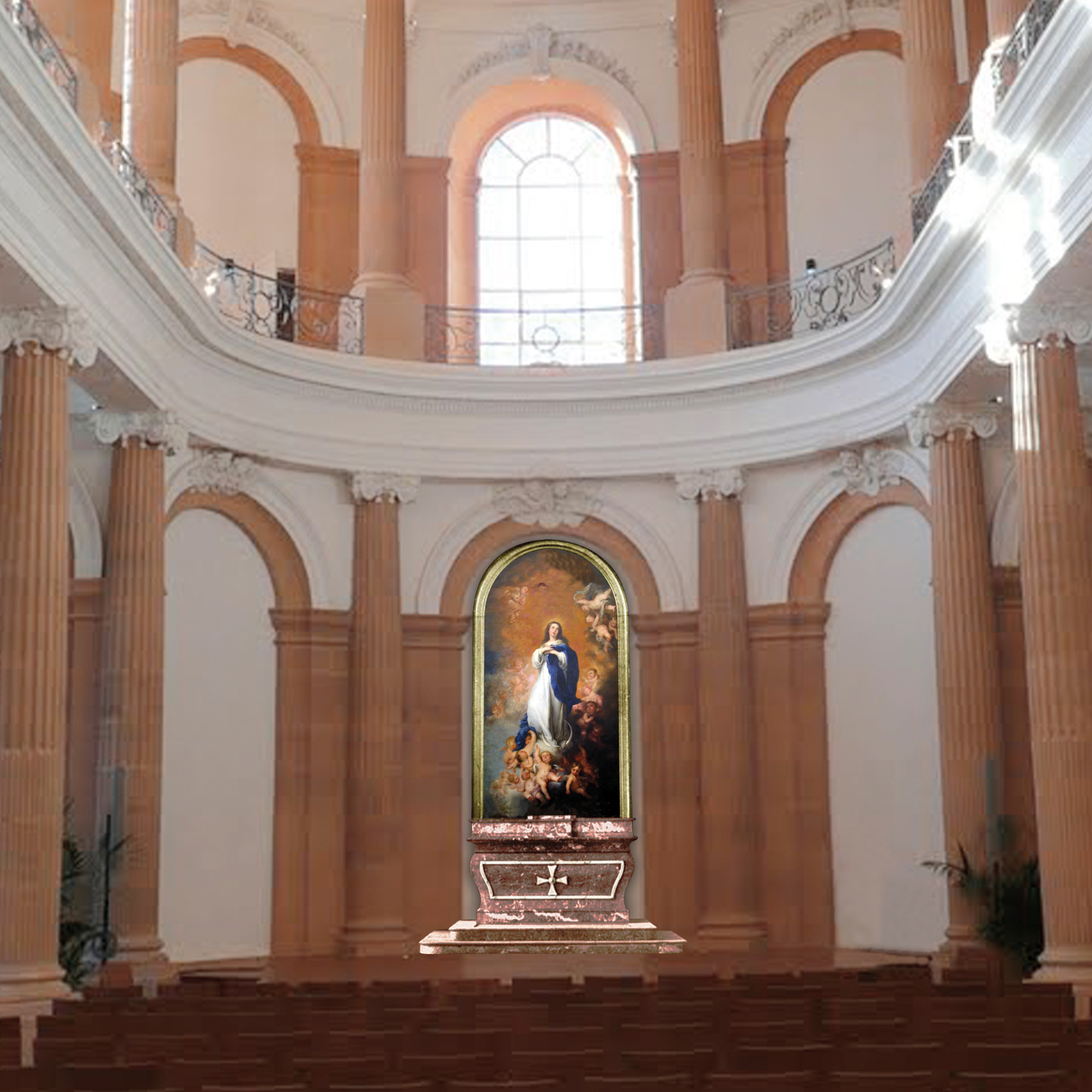 Restitution numérique de l'autel de la chapelle du château de Lunéville surmonté d'un tableau représentant l'Immaculée Conception, d'après l'œuvre de Bartolomé Esteban Murillo : L'Immaculée Conception des Vénérables ou "de Soult" (Jean-de-dieu de Soult l'ayant subtilisé à l'Espagne durant la guerre d'Indépendance espagnole)